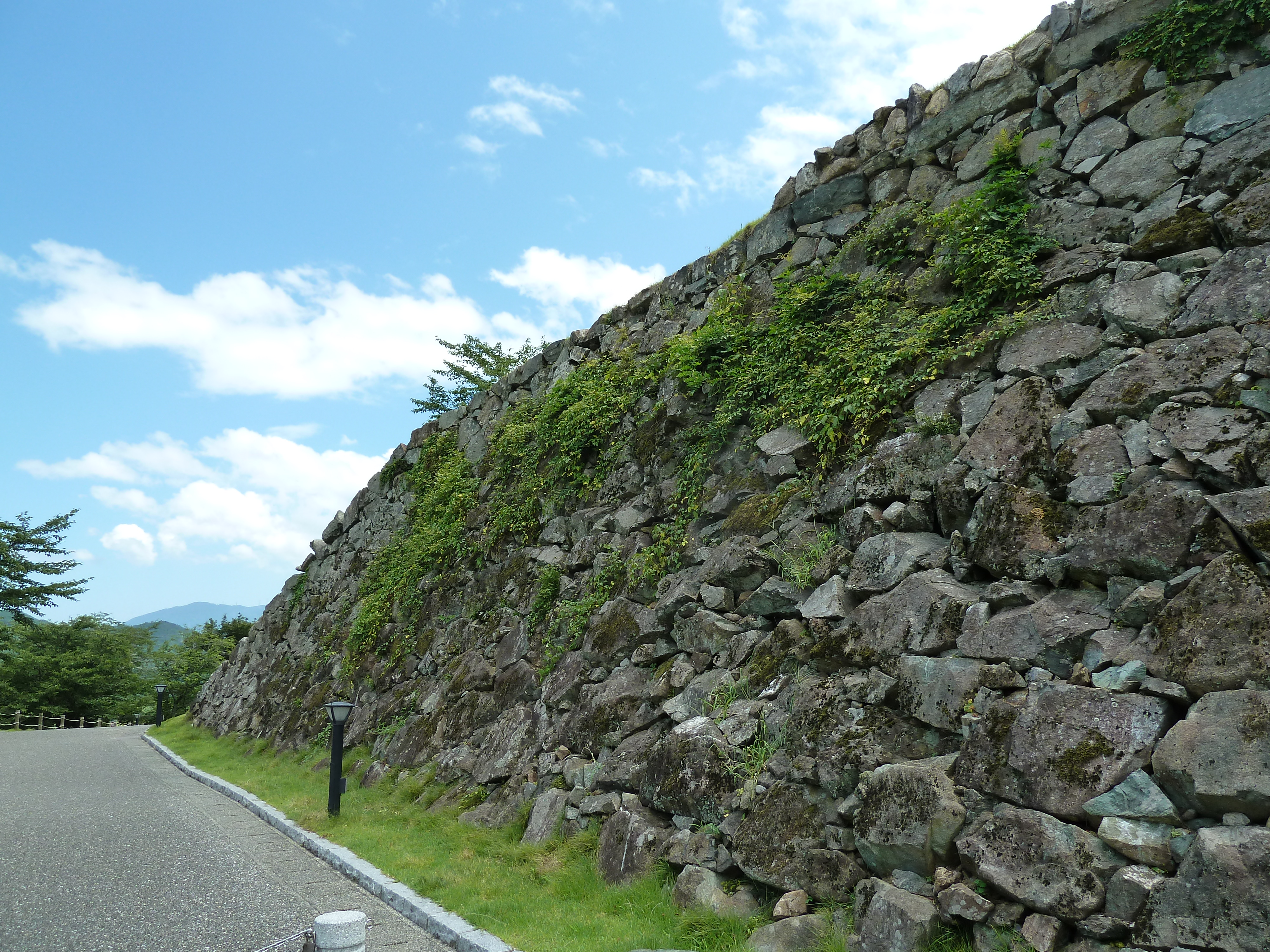 大洲城の石垣